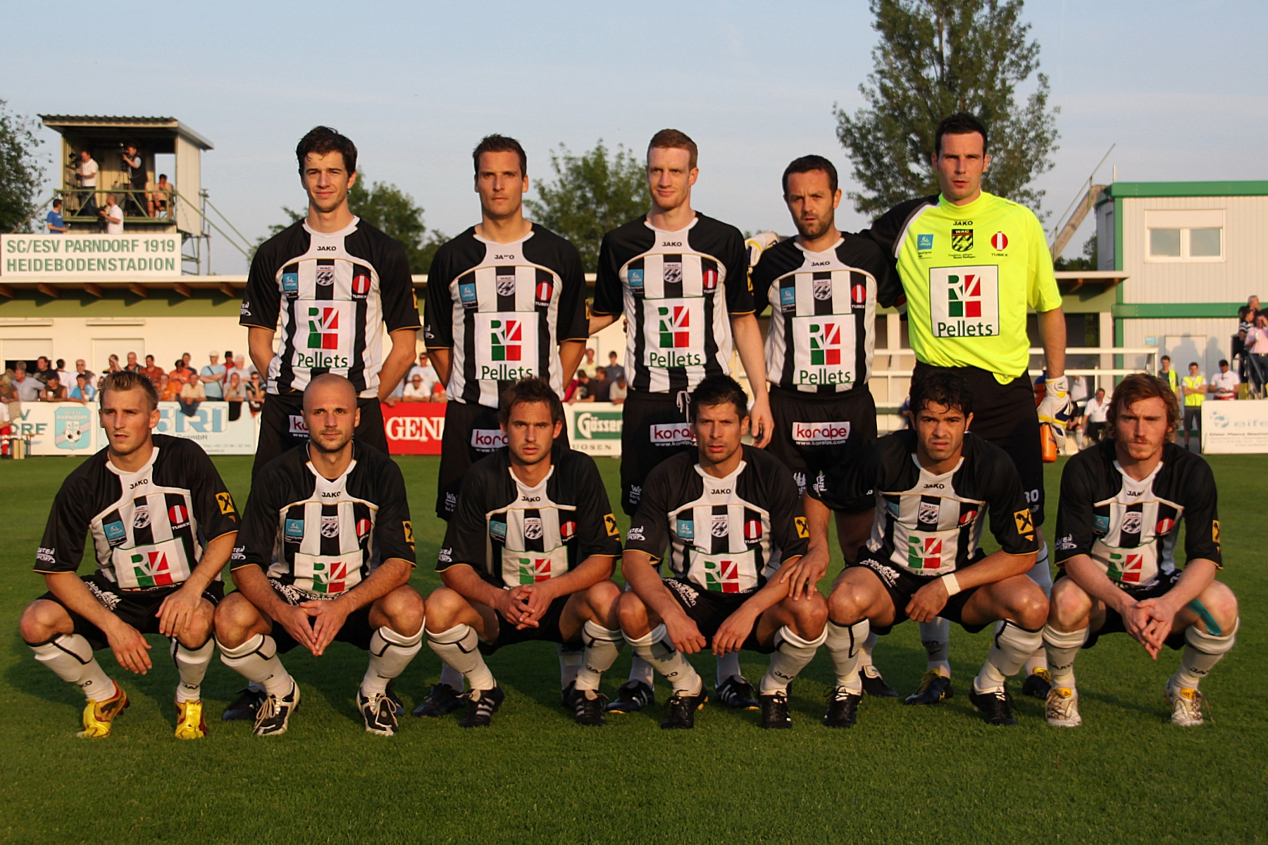 Die Mannschaft des Wolfsberger AC/SK St. Andrä im ersten Relegationsspiel gegen SC-ESV Parndorf 1919 (Ergebnis 1:0 für Parndorf) → Für die Spielernamen bitte mit der Maus über das Bild fahren